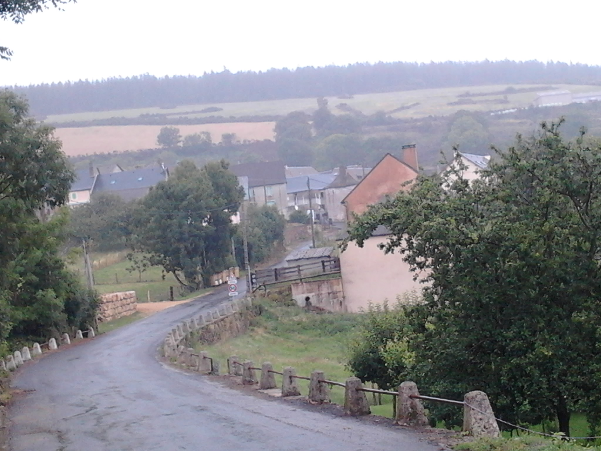 Le village des Hermaux, en Lozère.